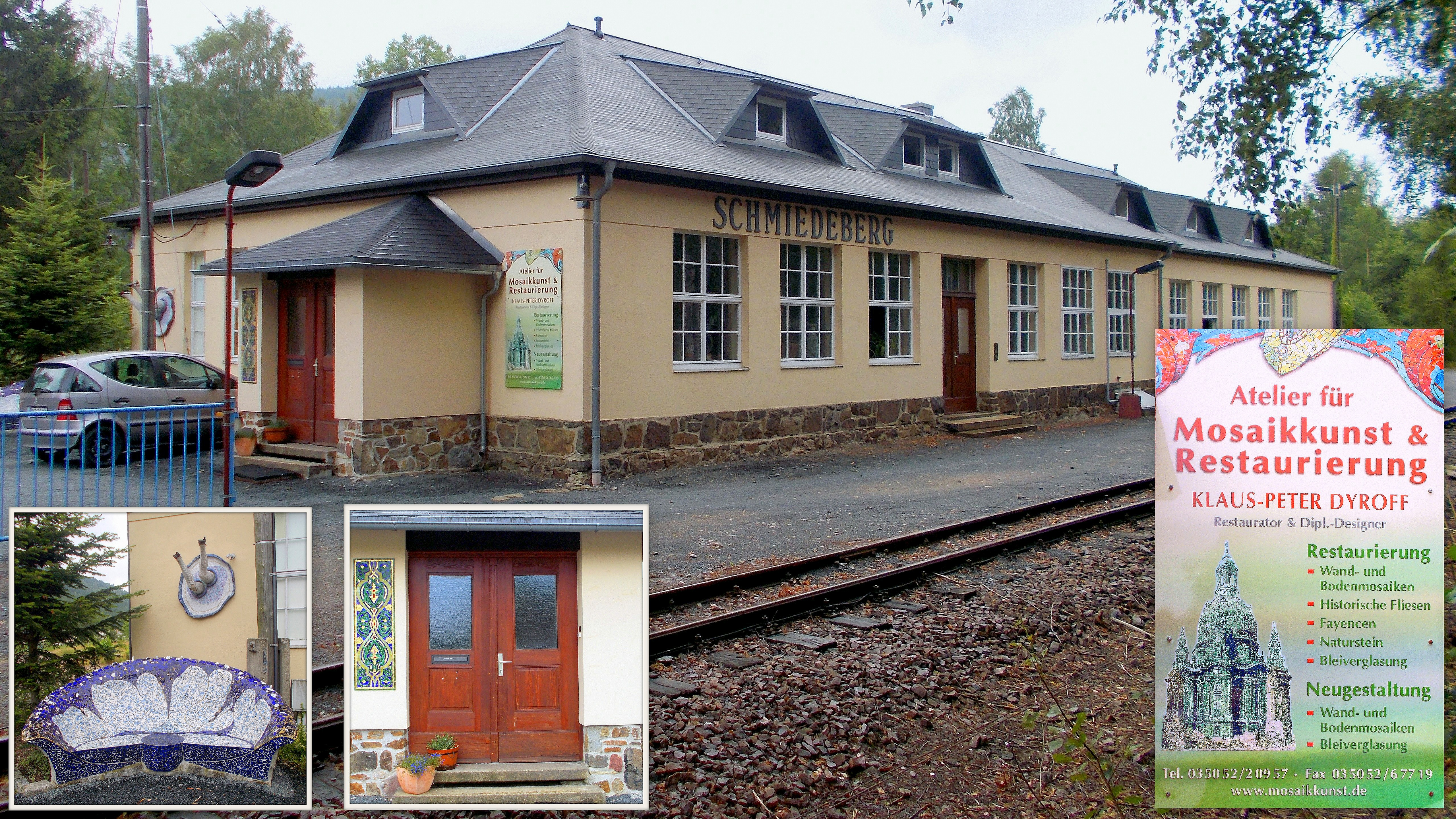 Atelier Mosaikkunst Dyroff in Schmiedeberg im ehemaligen Bahnhofsgebäude.